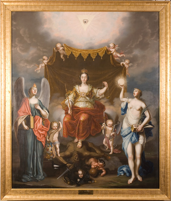 Justitia